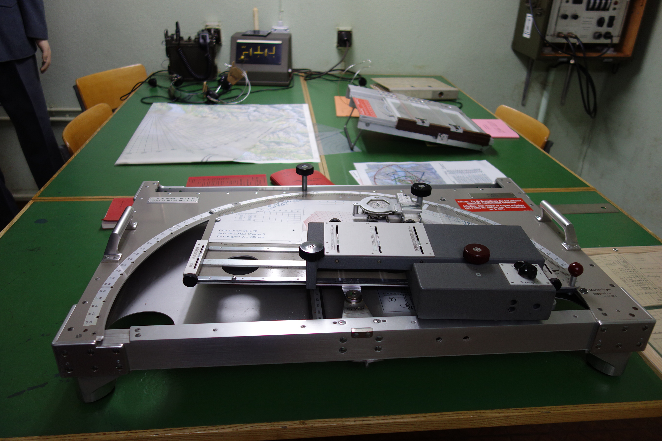 Artilleriewerk Mühlefluh, Vitznau LU, Schweiz